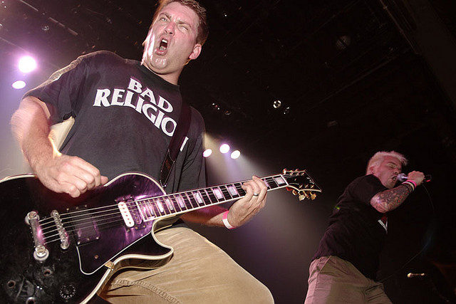 Fuente: ( Autor: Desconocido